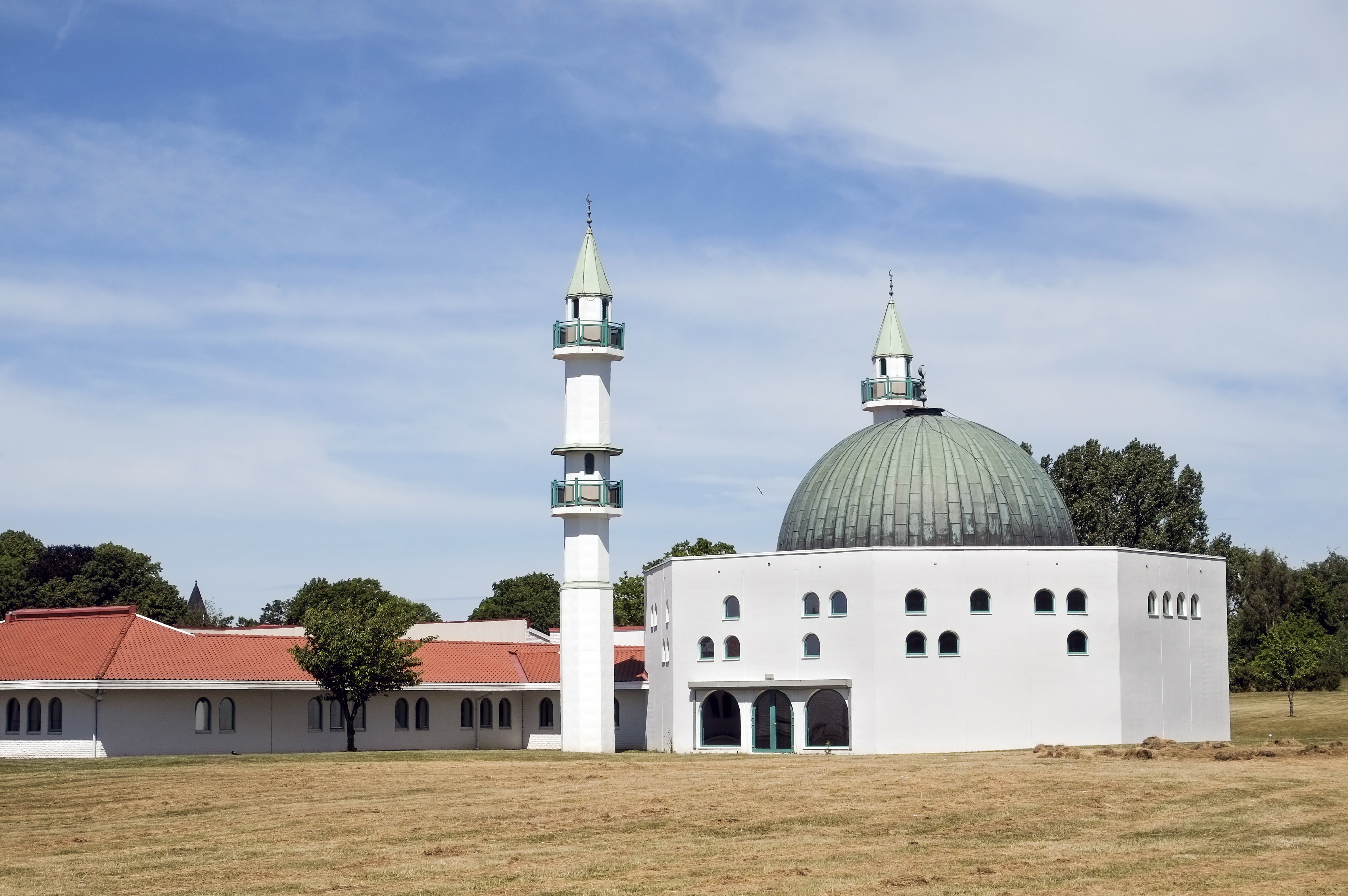 Mosken i Malmö som drivs av Islamic Center i Malmö. Fredagen den 20 april 1984 hölls den första fredagsbönen i den då nybyggdaa moskén.